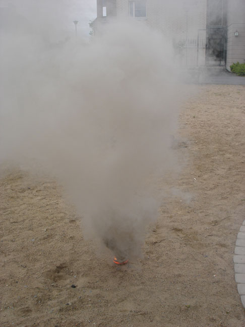 Savumassa